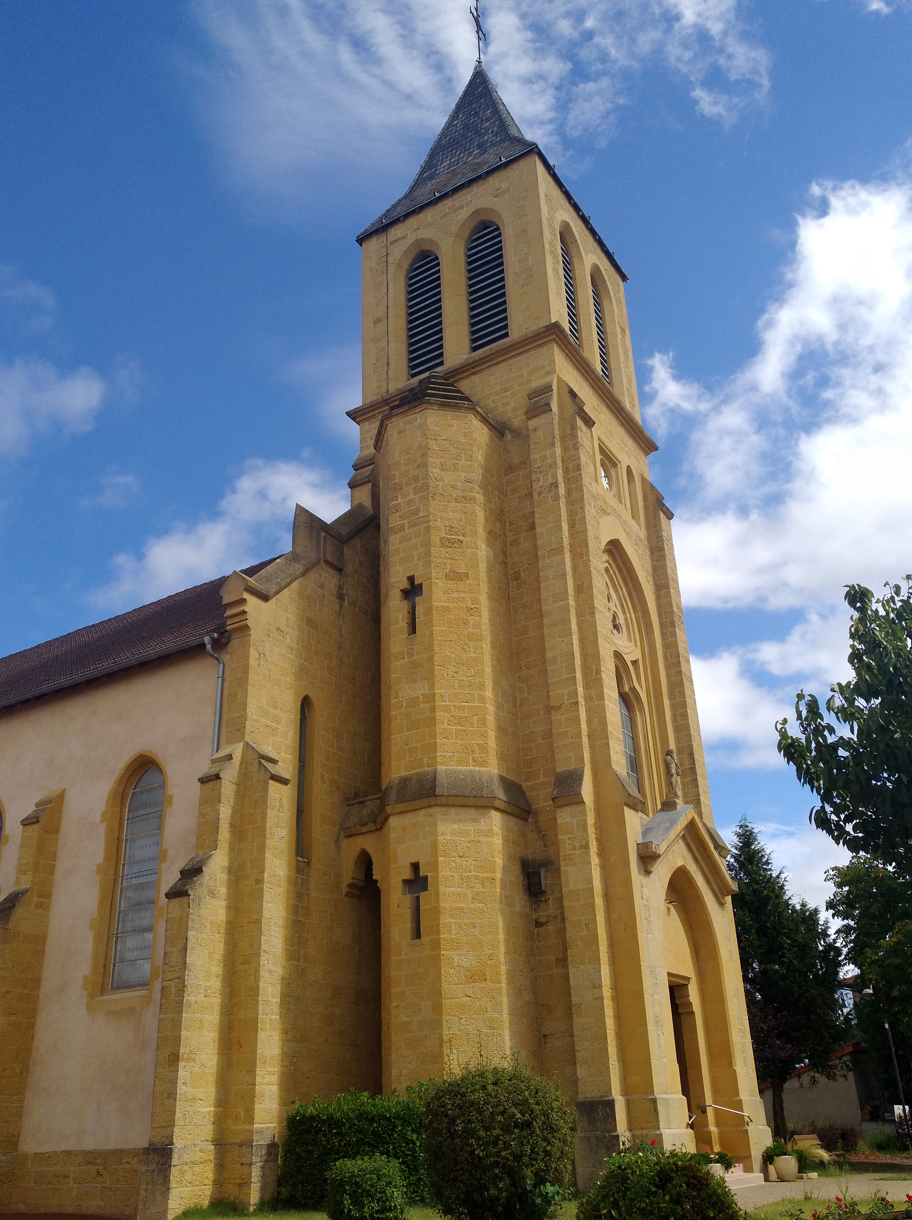 Clocher de l'église Saint-André de Villers, dans le département de la Loire.